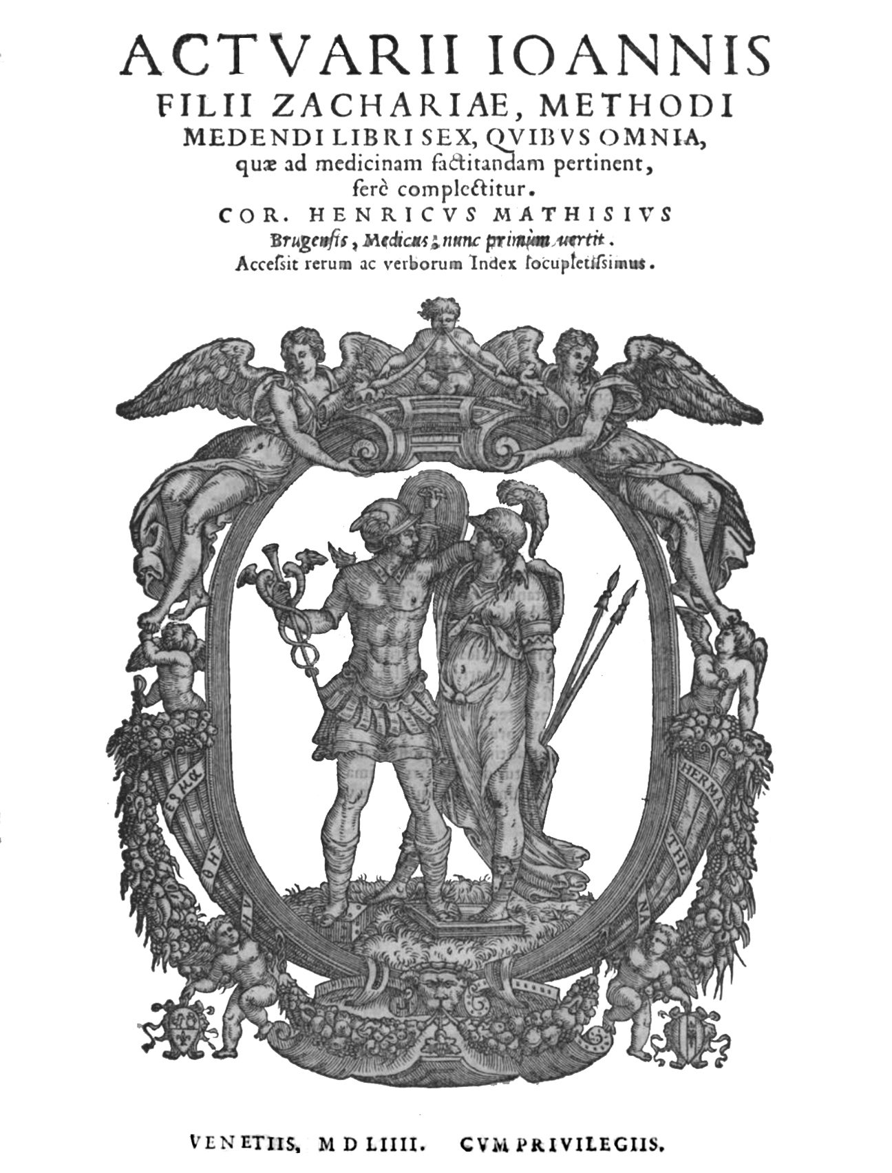 Titelseite